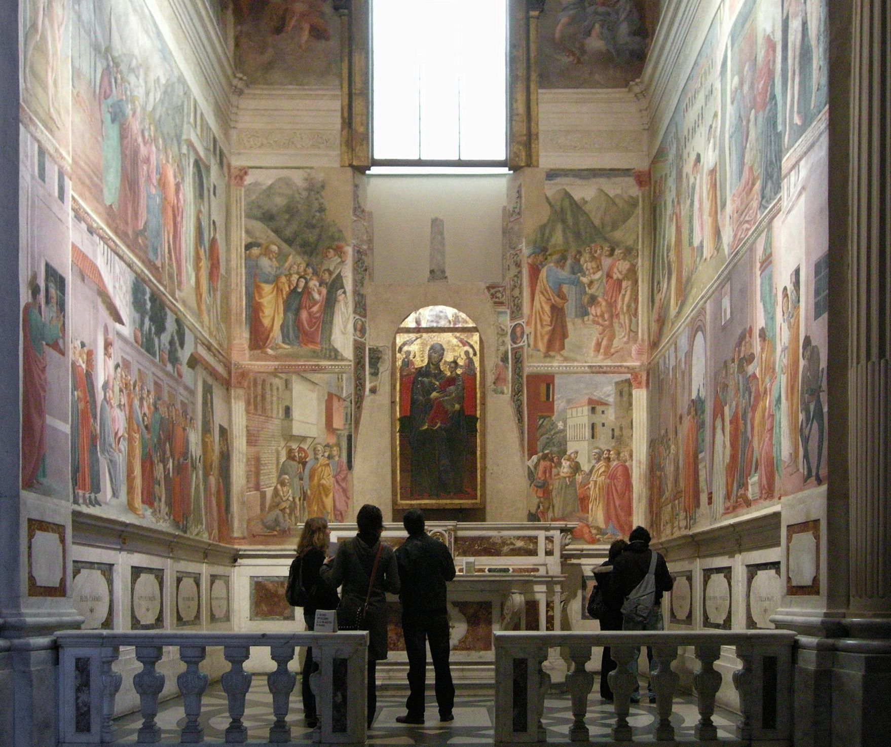 Brancacci Kapelle (Gesamtansicht), S.Maria del Carmine, Florenz